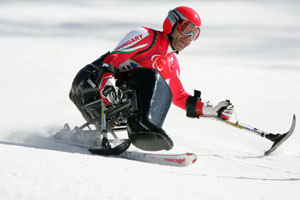 navratyil